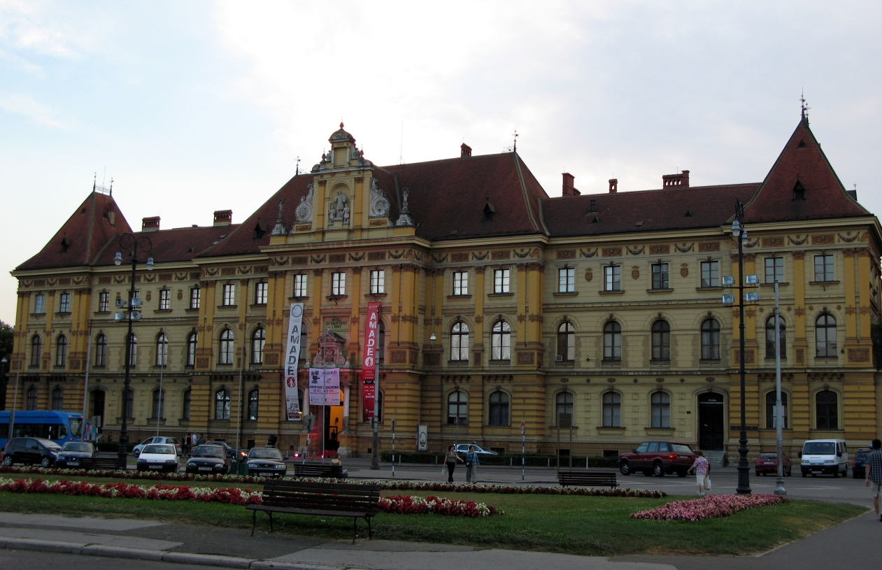 Muzej za umjetnost i obrt, Zagreb